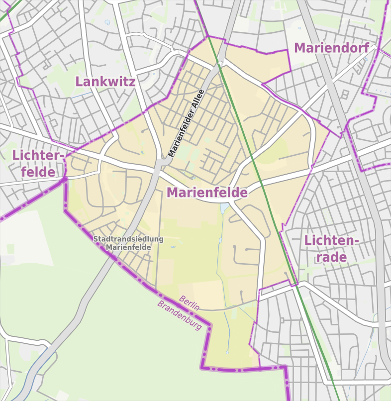 Übersichtskarte der Straßen und Ortslagen in Berlin-Marienfelde